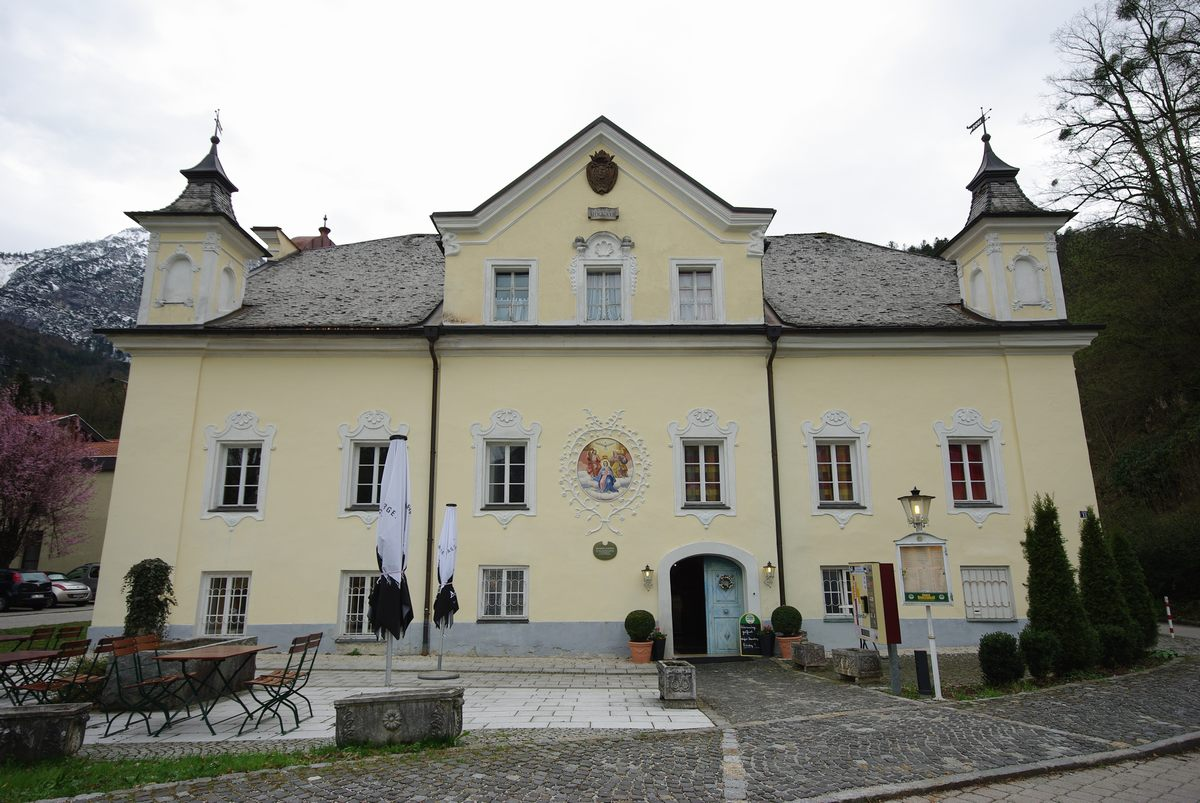 Kirchberg-Schlössl, Thumseestr. 11, 83435 Bad ReichenhallThis is a photograph of an architectural monument.